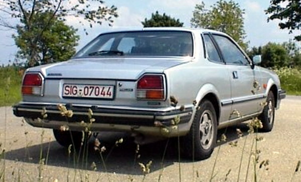 Honda Prelude (1978-1983 Typ SN)